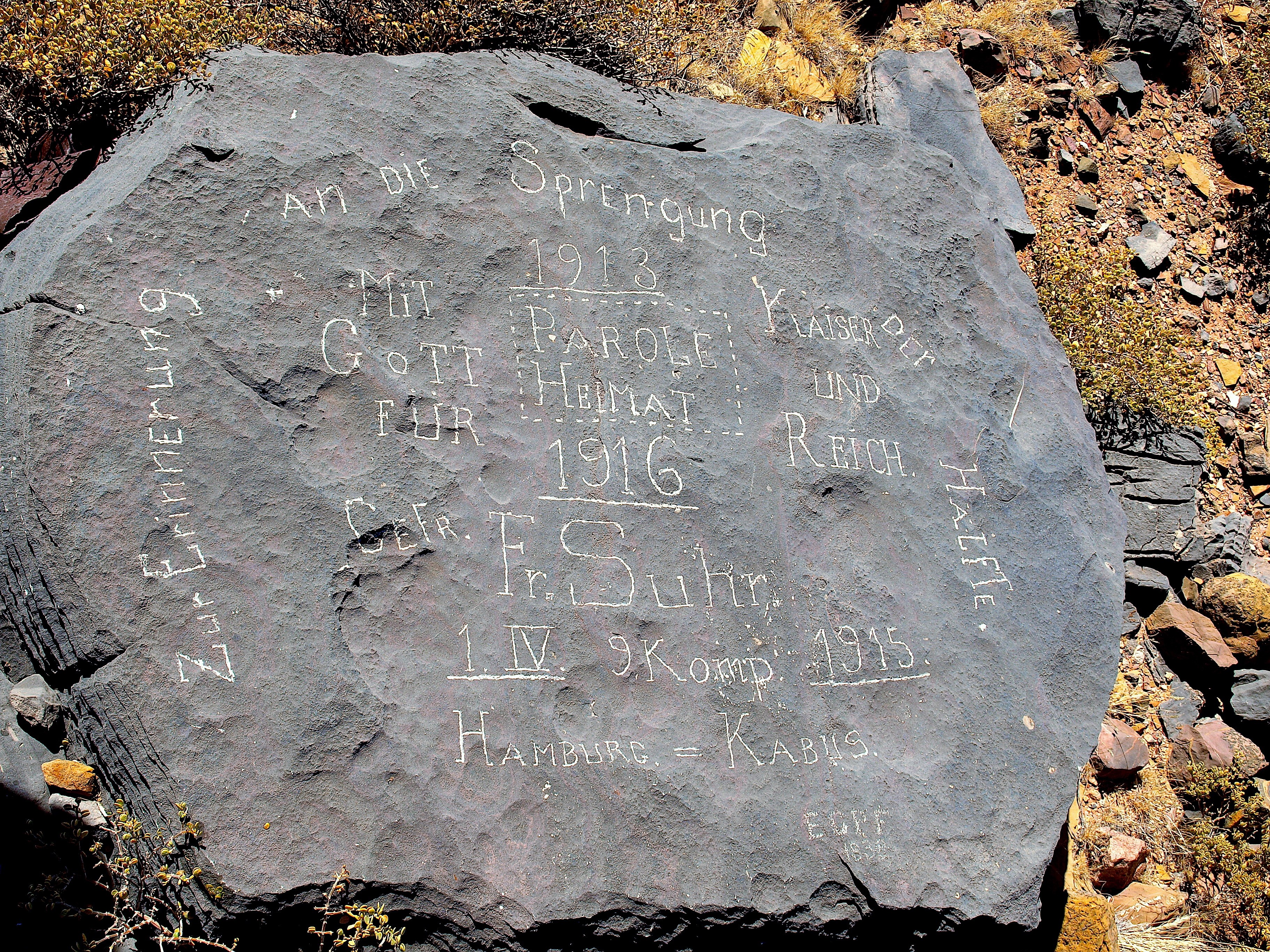 Gedenkstein auf Farm Jakkalskop, Namibia